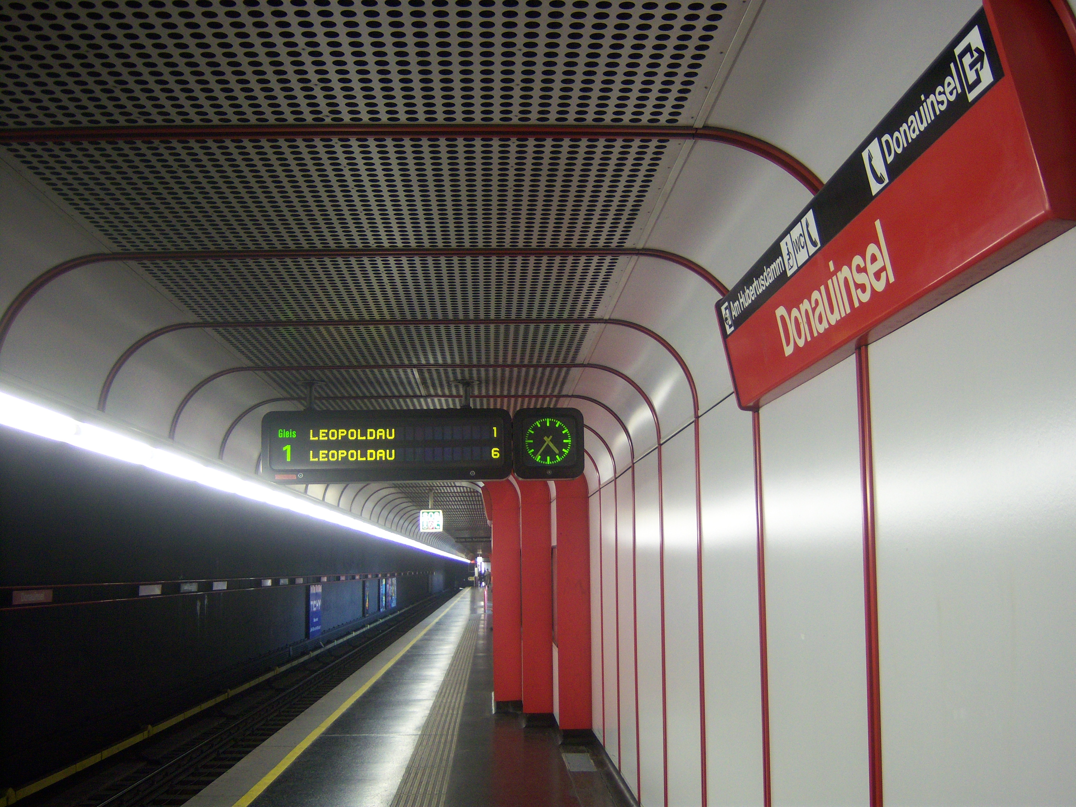 U1-Station Donauinsel